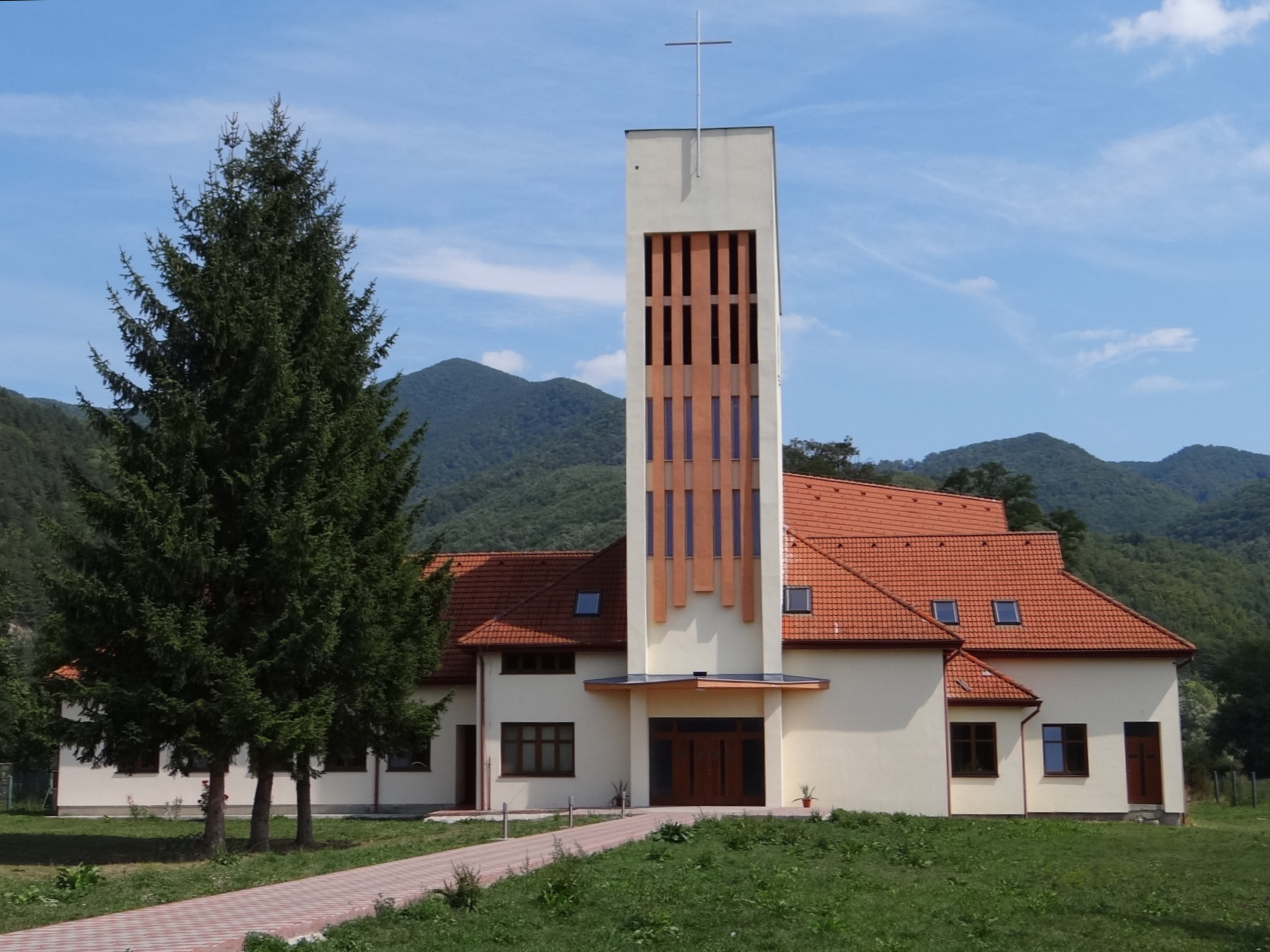 Krpeľany.